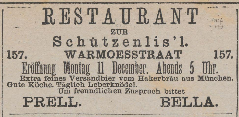 Anzeige zur Eröffnung des Lokals Zur Schützenlis'l durch den späteren Verleger und Chefredakteur der Deutschen Zeitung für die Niederlande August Prell.